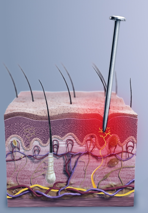 Esquema en el que se representa un estímulo doloroso activando los receptores del dolor y las vías nociceptivas.